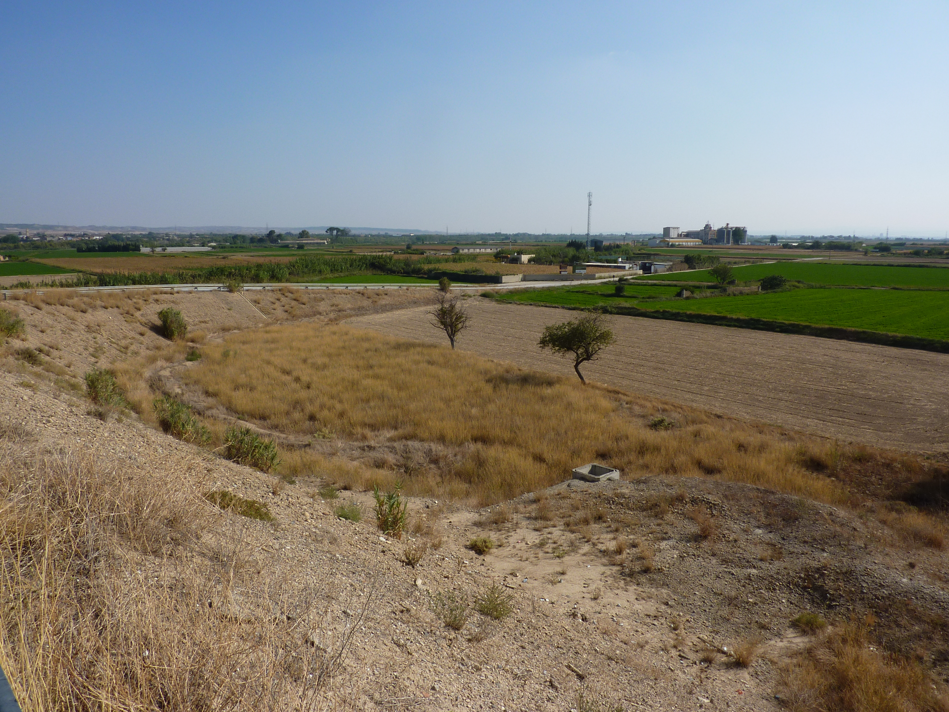 Des champs iirigués à Villanueva de Gallefo (province de Saragosse en Aragon)